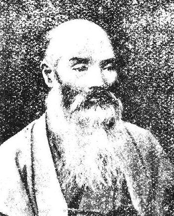 をトリミングしたもの